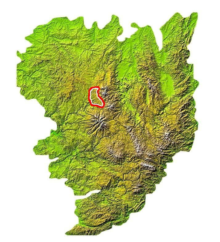 Situatin de l'Artense sur la carte du Massif central